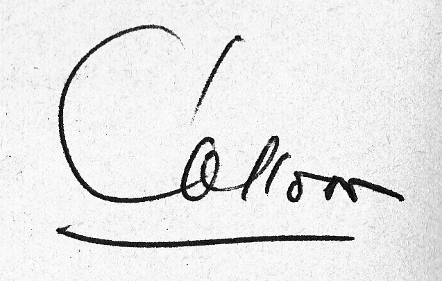 Signature de Frédéric Collon